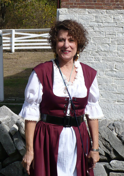 Lorraine Murray